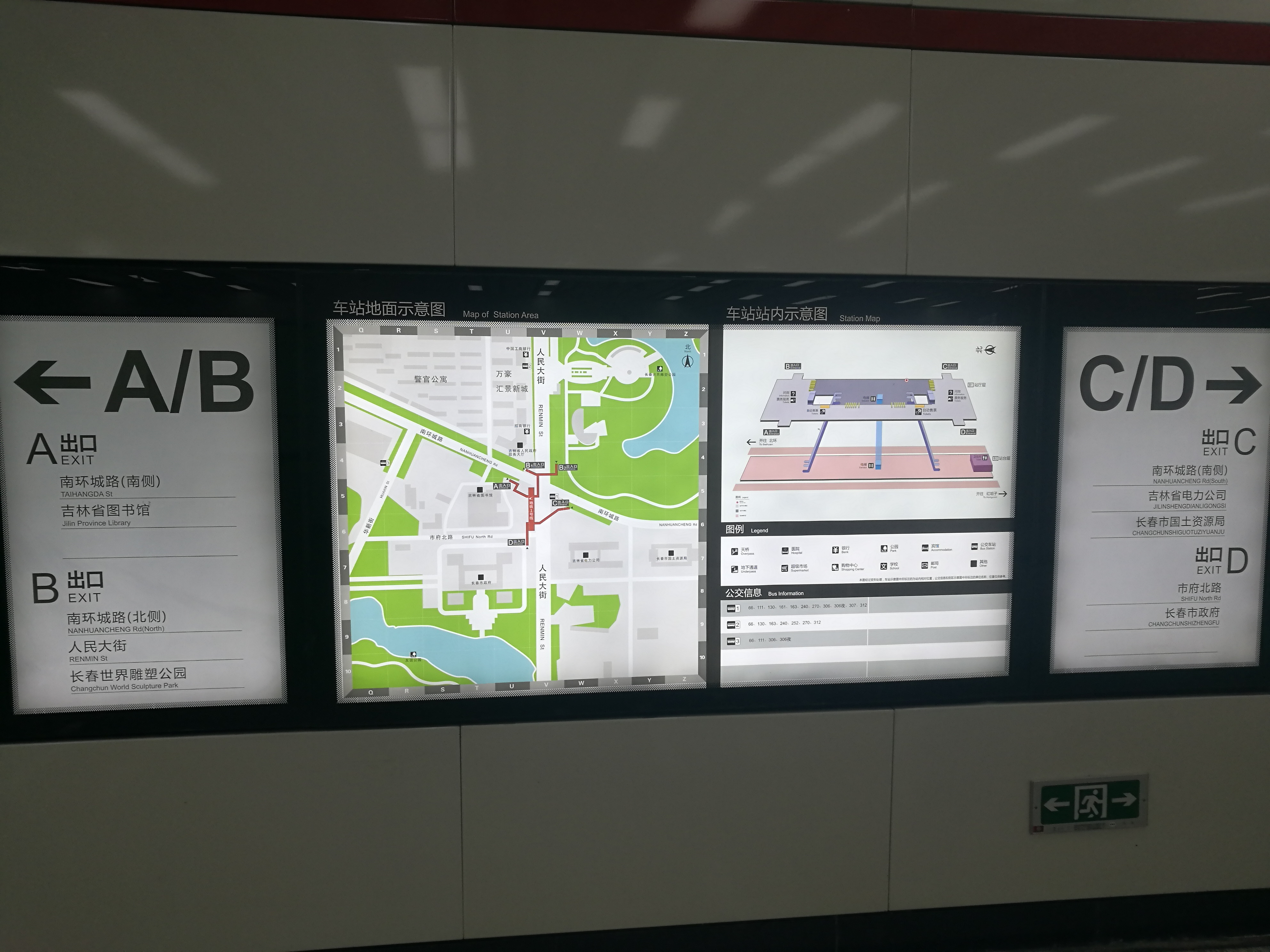 南环城路站出入口信息